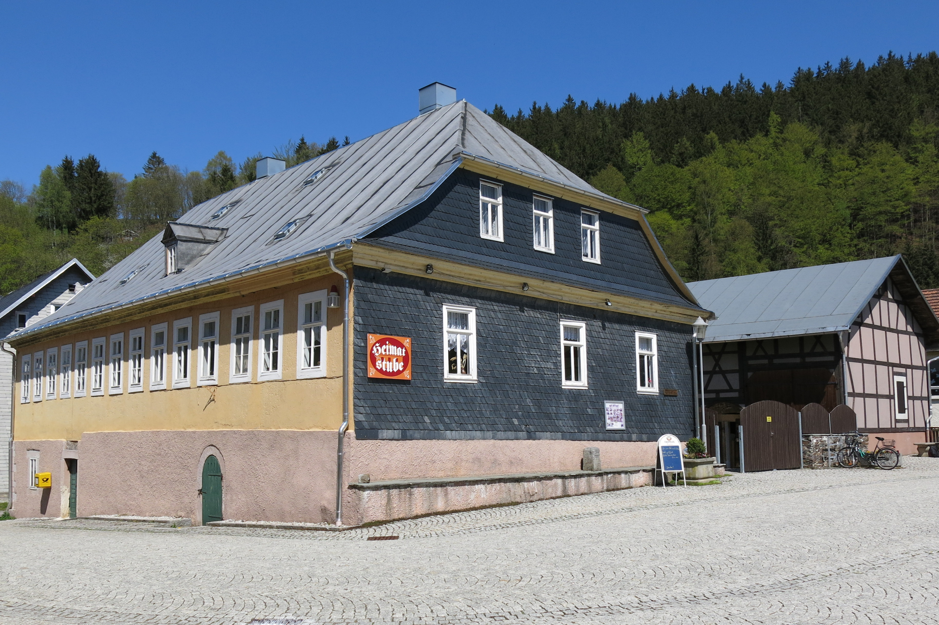 Im ehemaligen Lindigforsthaus befindet sich die Heimatstube der Gemeinde Katzhütte.